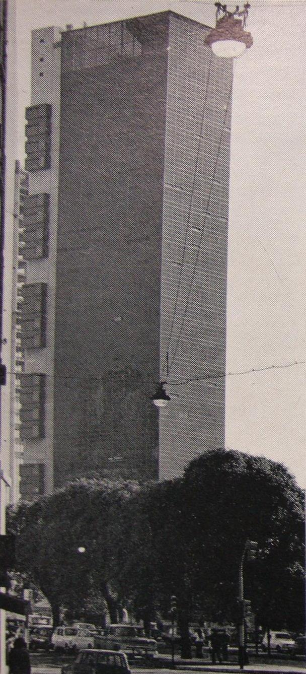 La Torre de la Unión Industrial Argentina (hoy Torre Carlos Pellegrini) hacia 1975. Diseñada por el Estudio Manteola, Petchersky, Sánchez Gómez, Solsona, Santos y Viñoly.